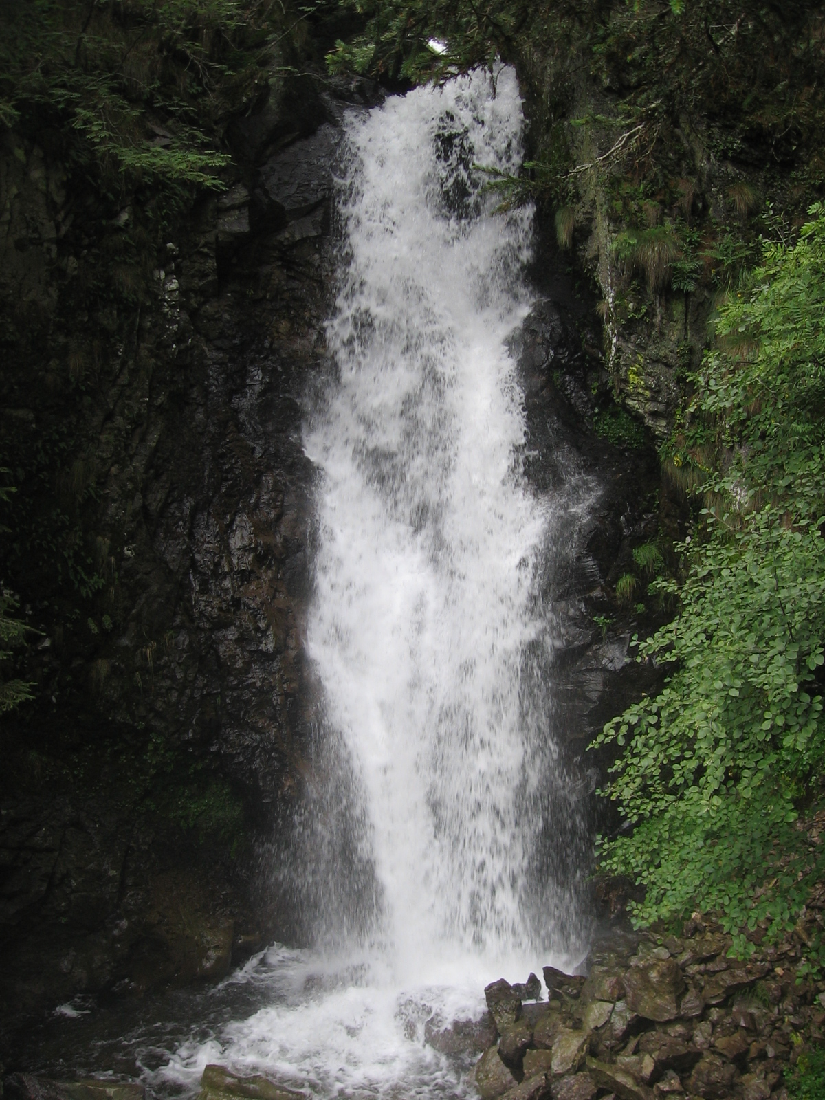 Foppolo, Bergamo, Italy